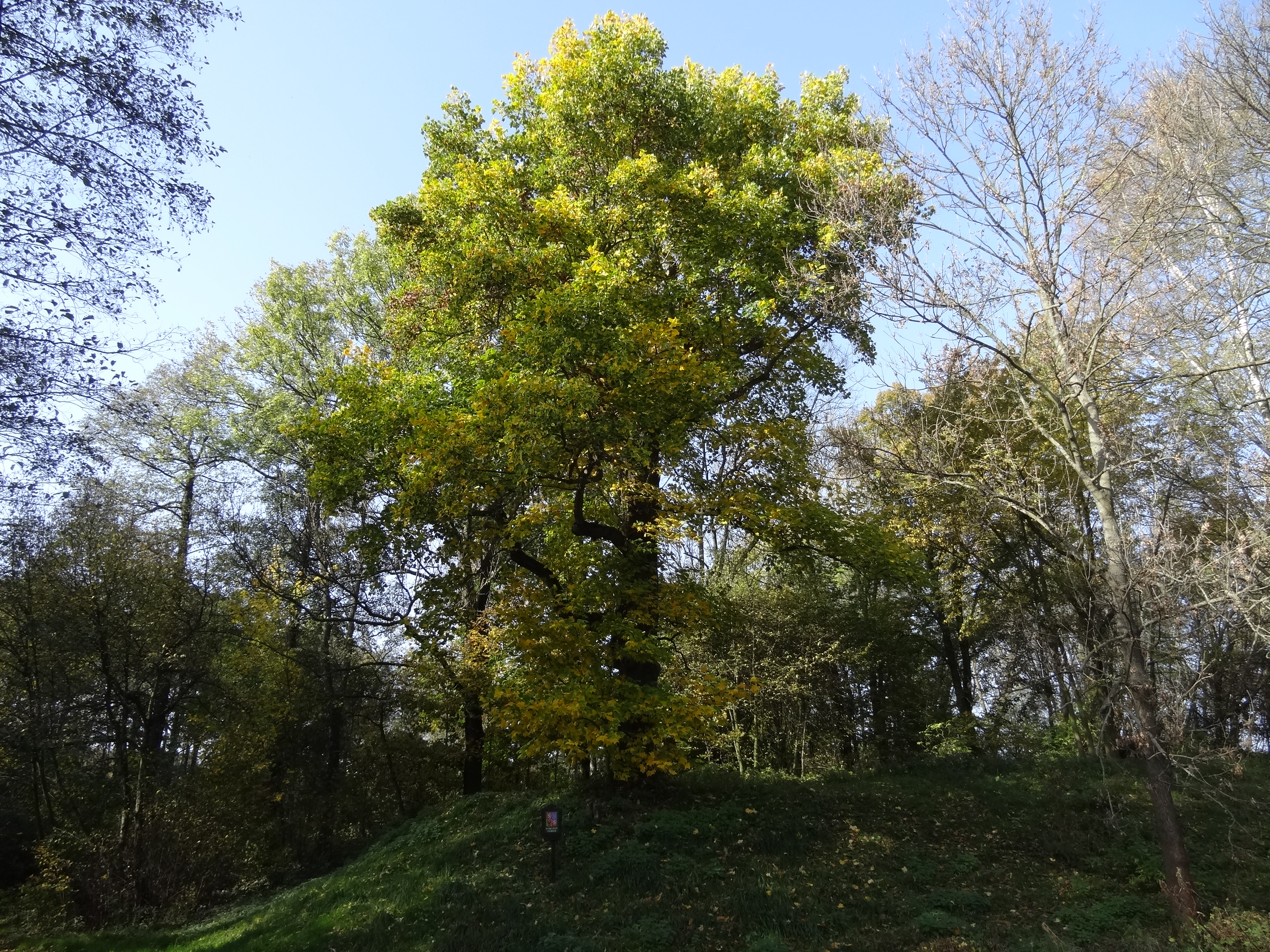 Kunratický liliovník - památný liliovník tulipánokvětý v Kunraticích u Frýdlantu